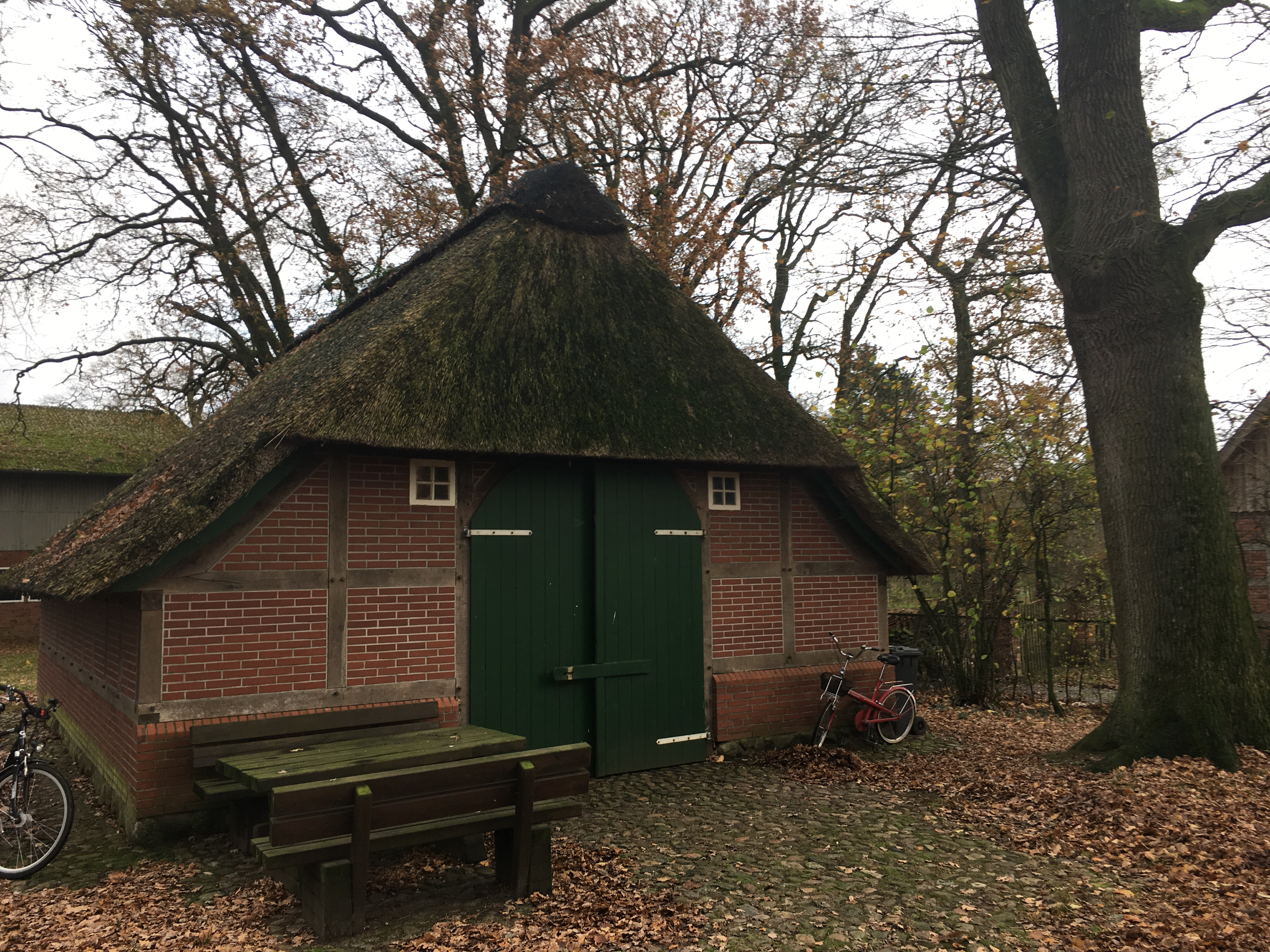 fröheren Schaapstall in Barchel